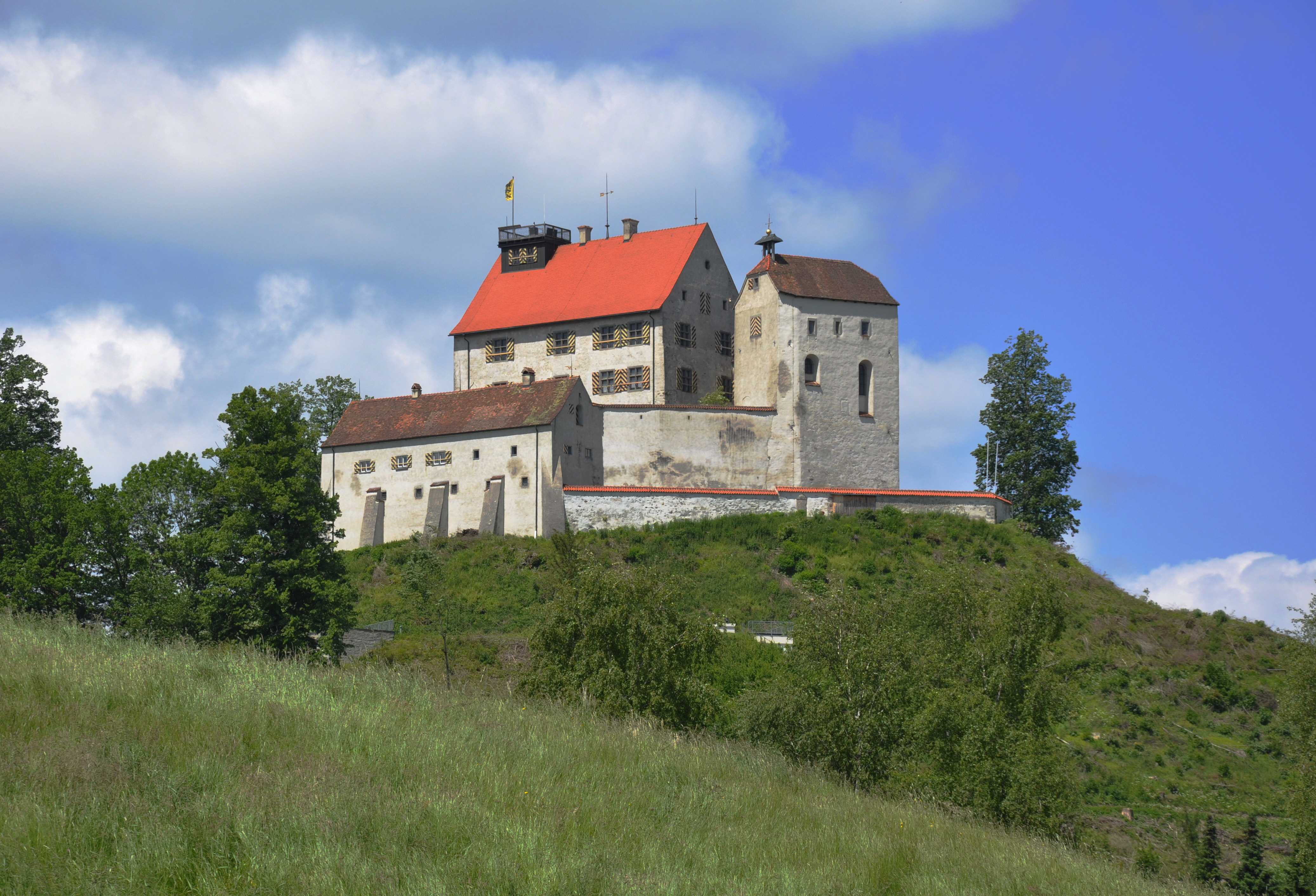 Waldburg (Württemberg), Landkreis Ravensburg; die Waldburg